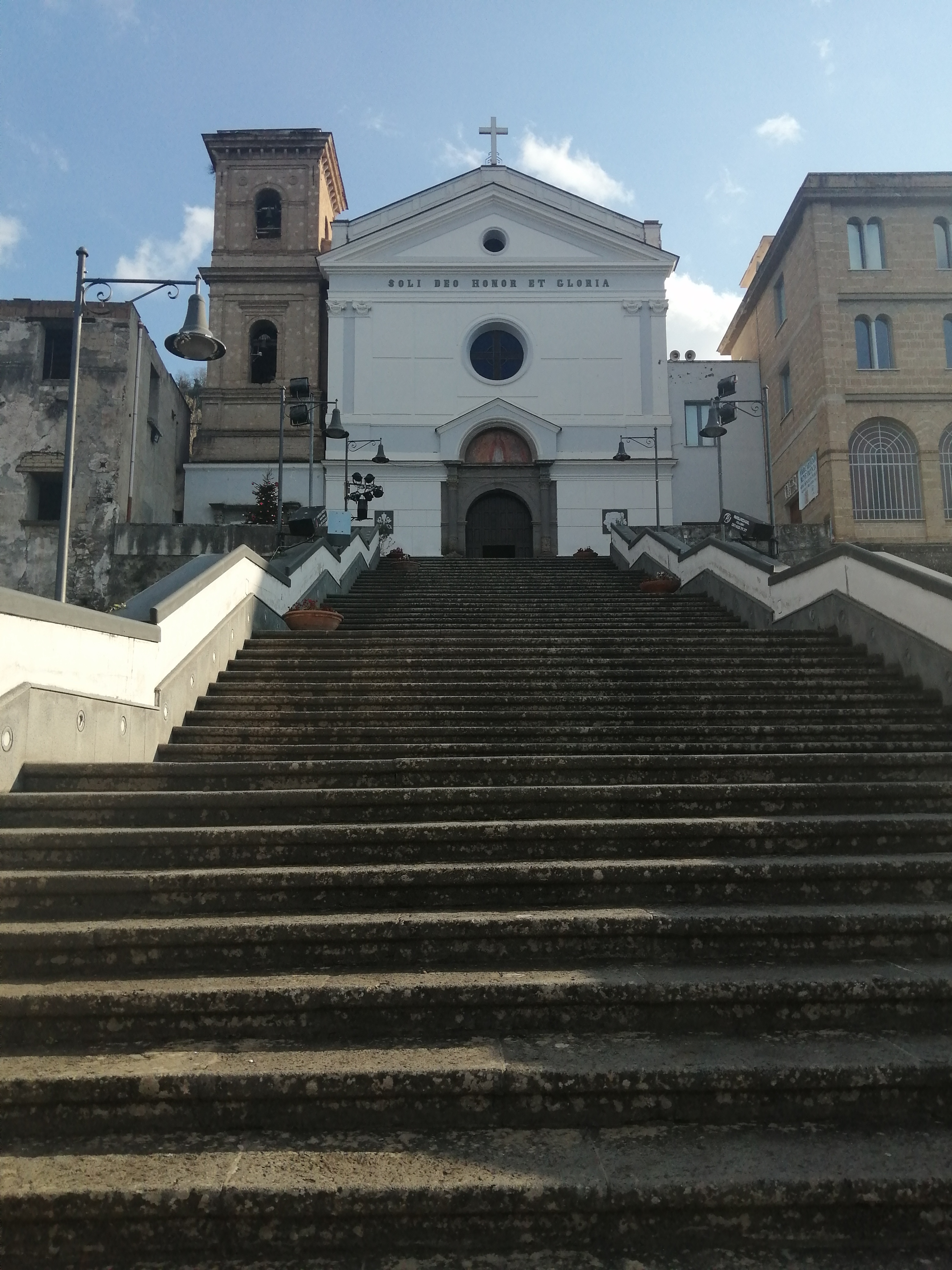 Santuario diSanta Maria a Parete, Liveri